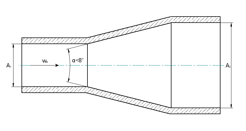 Diffusor mit Öffnungswinkel